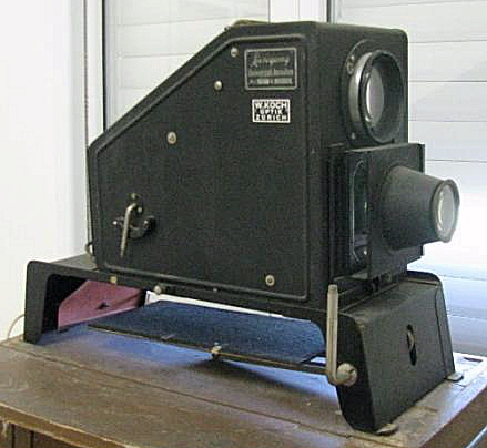 מקרן התמונות בנוסח הישן, הרבה לפני המחשב.